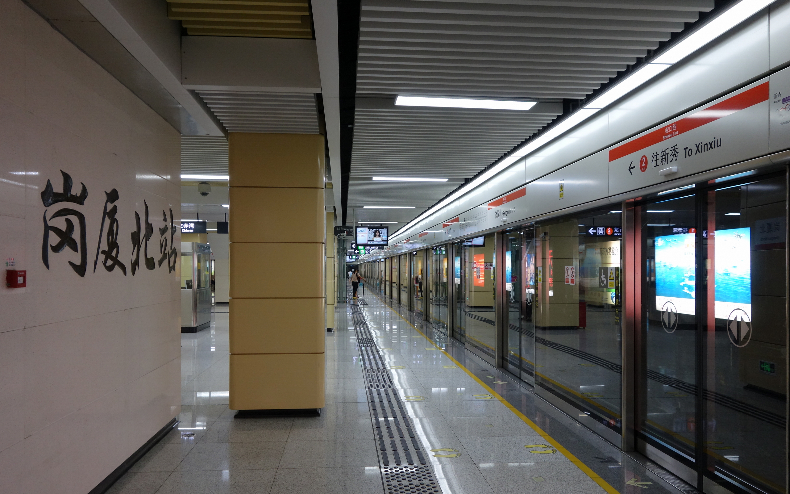 蛇口线岗厦北车站站台